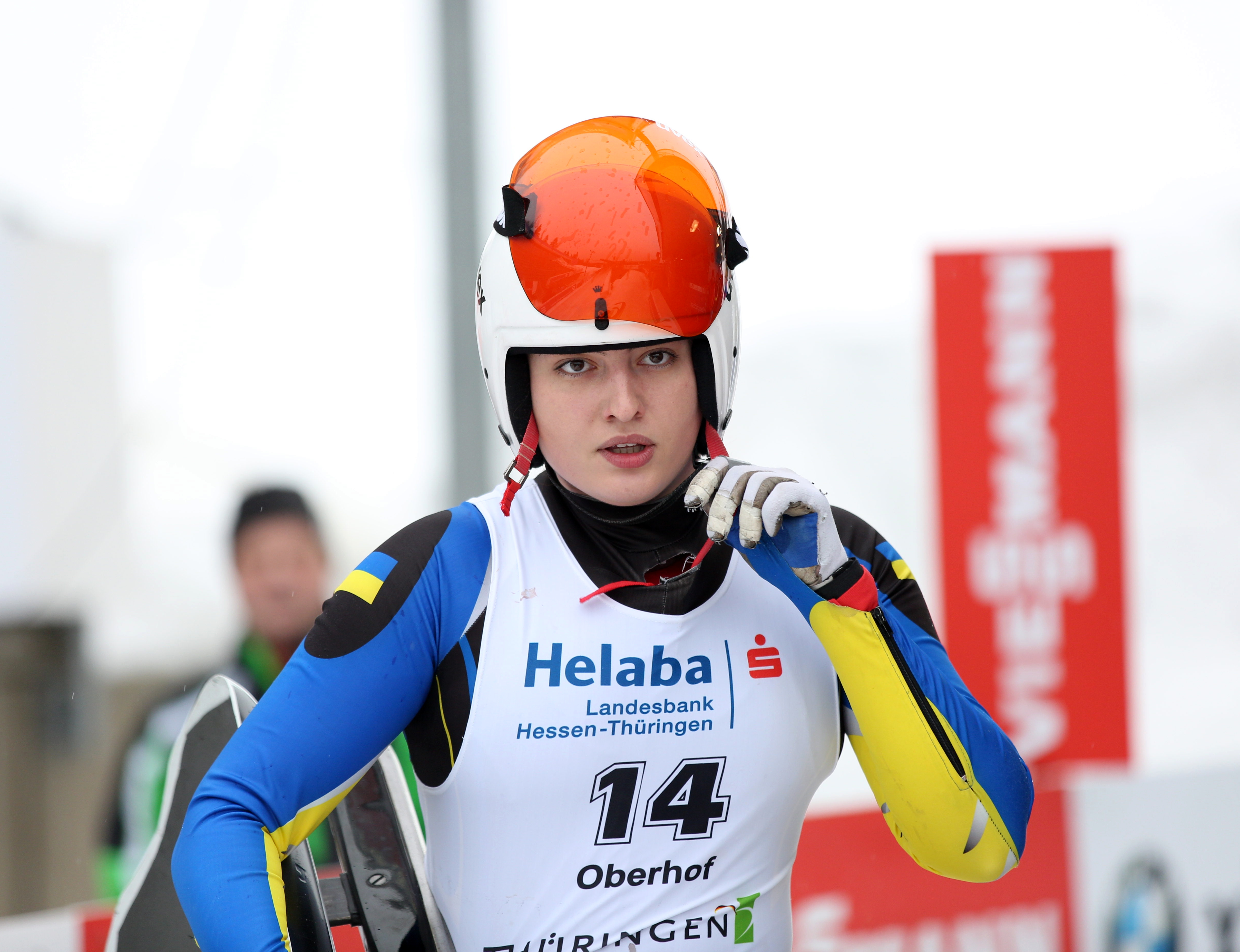 Olena Shkhumova beim HELABA Nationscup der Damen in Oberhof 2017